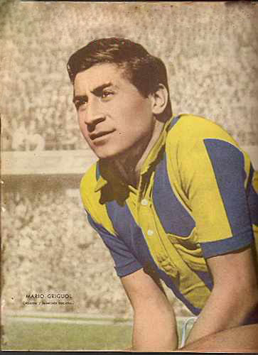 Mario Guiguol en 1961